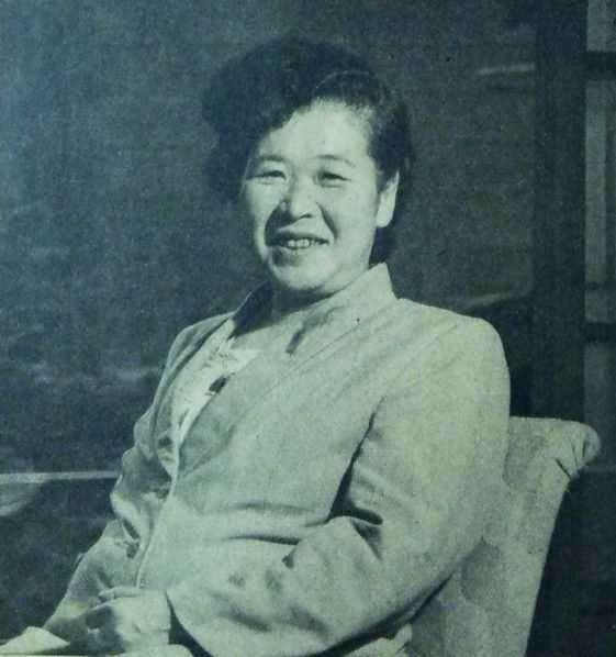 山下春江